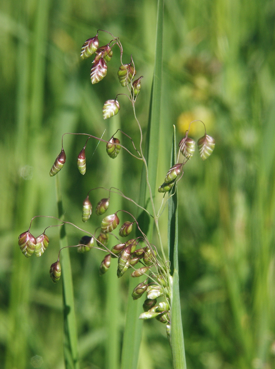 Briza media, Schwäbisch-Fränkischer Wald, Germany